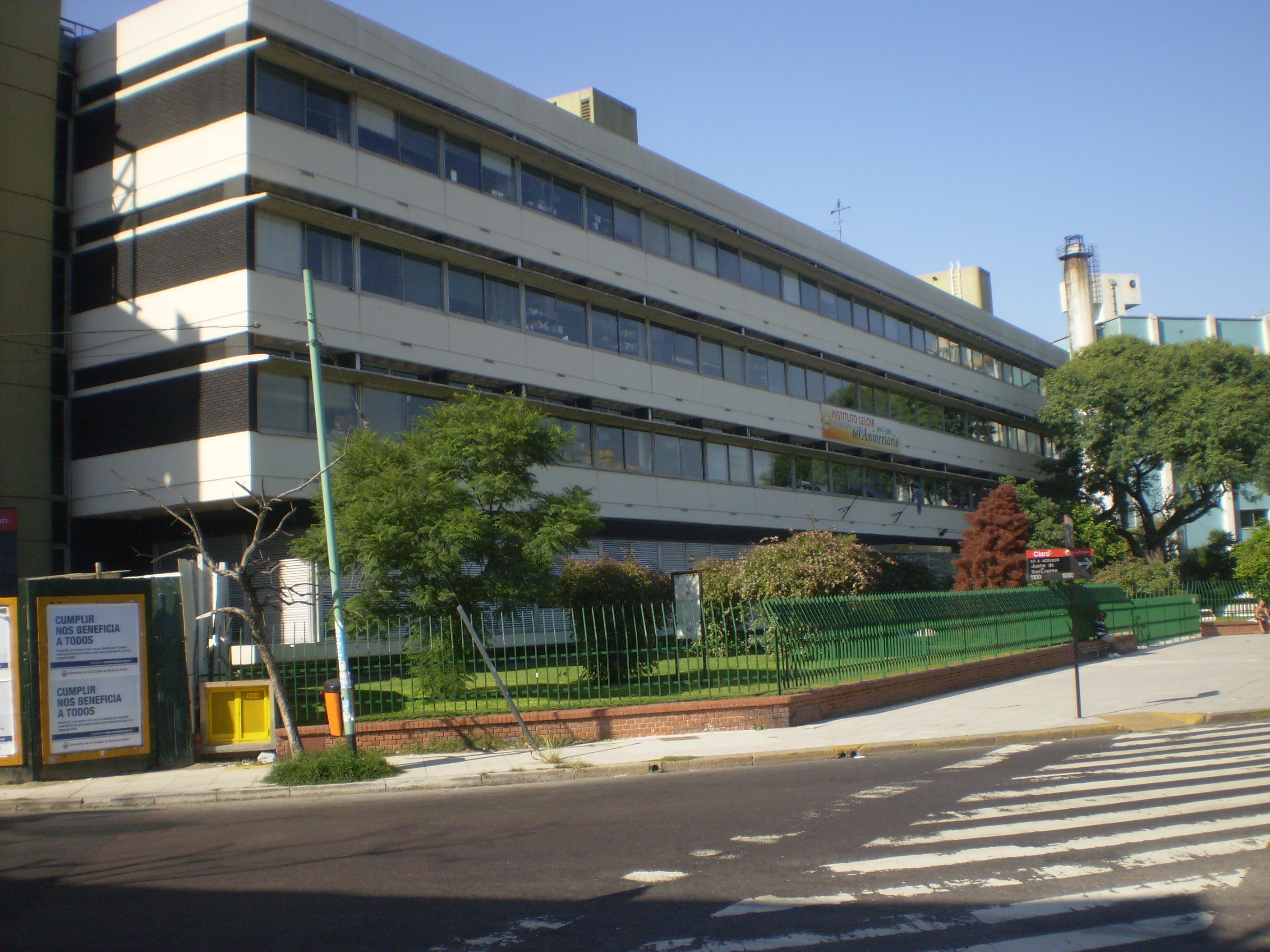 Sedes del Instituto Leloir, (Parque Centenario, Buenos Aires, Argentina)